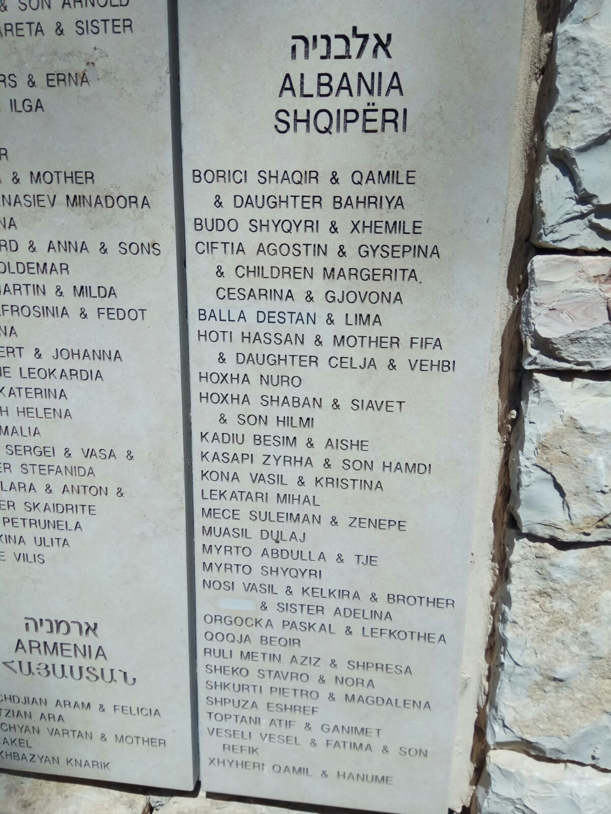 רשימת חסידי אומות העולם מאלבניה בקיר הזיכרון בגן חסידי אומות העולם ביד ושם